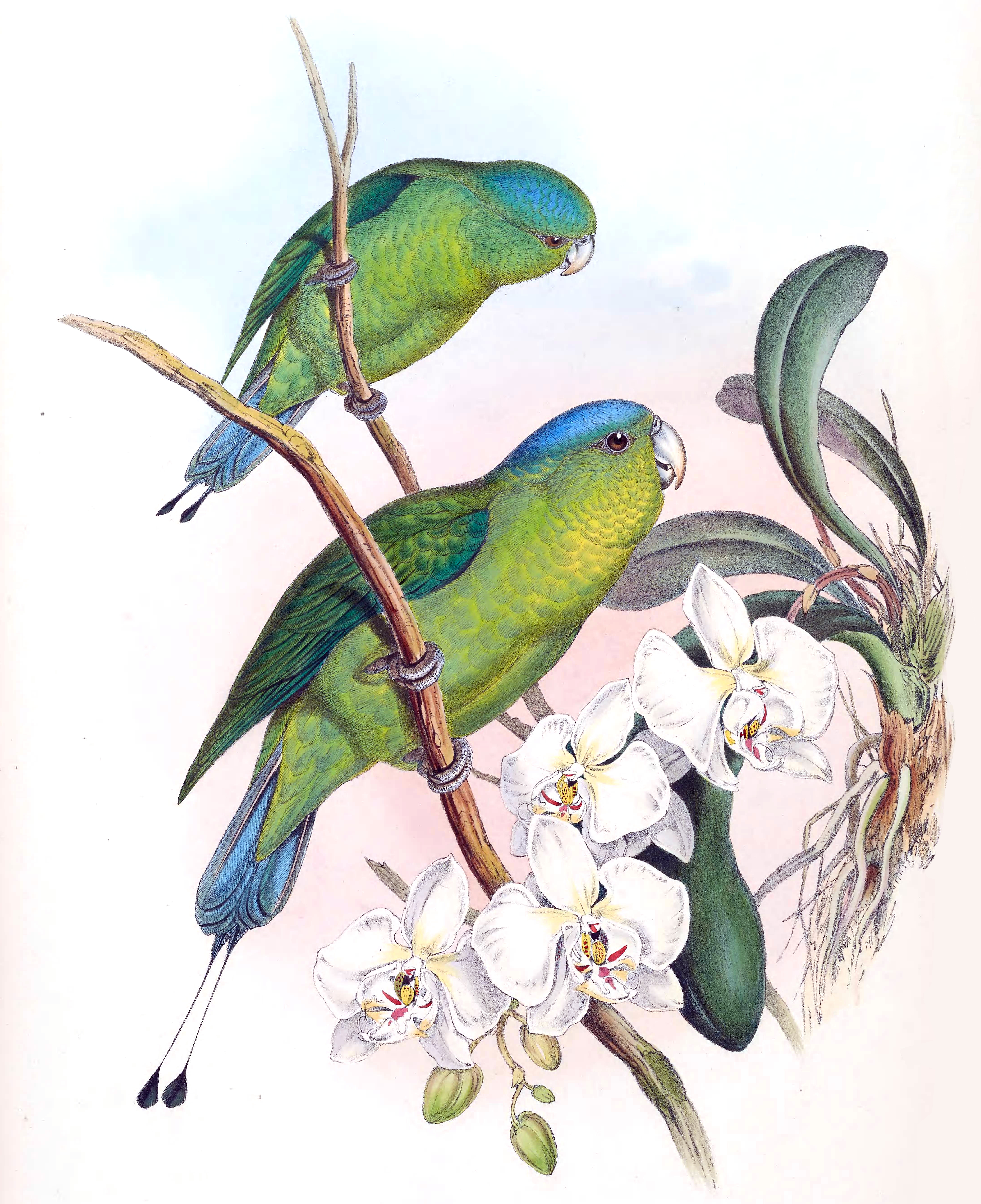 Prioniturus spatuliger = Prioniturus discurus[1]